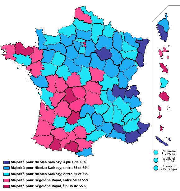 voir article sur l'élection présidentielle de 2007